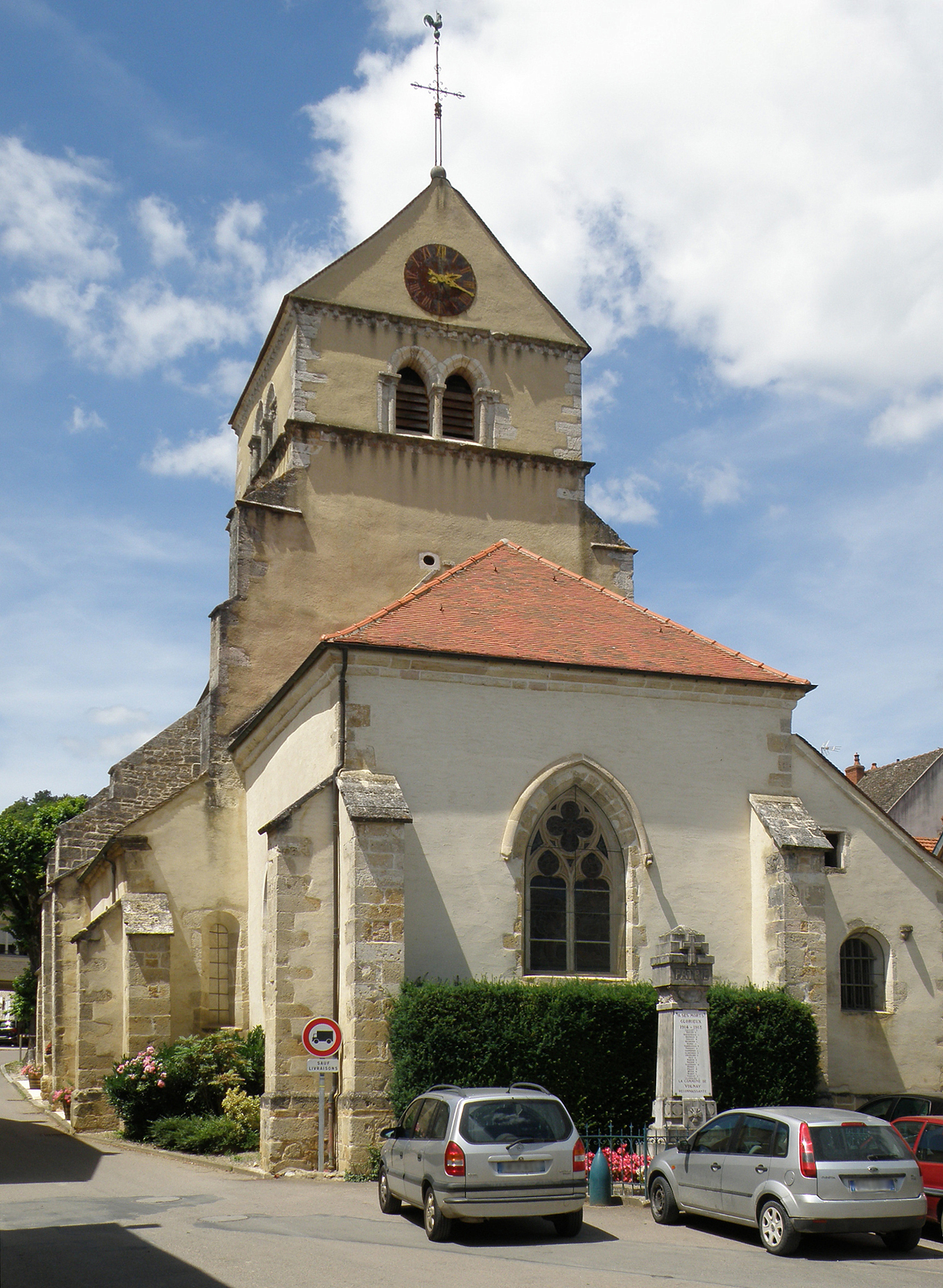 Volnay (Côte d'Or, Bourgogne, France). Église Saint-Cyr-et-Sainte-Julitte.